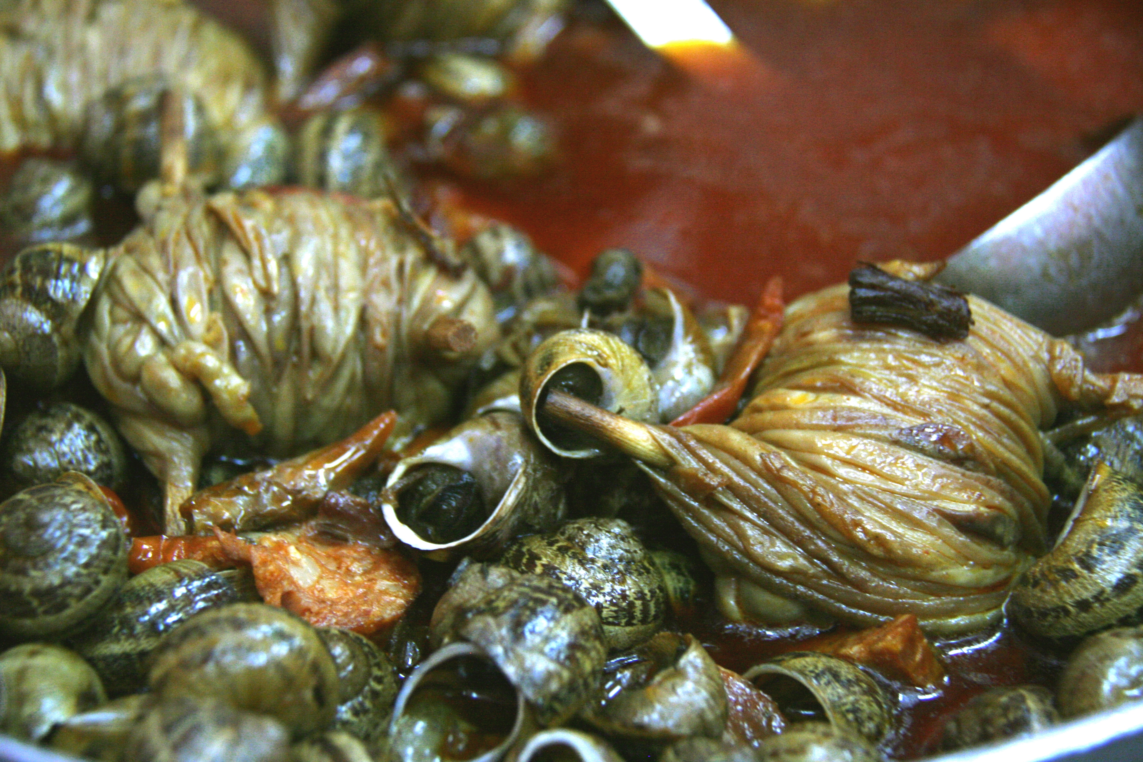 Cocido de caracoles, tripas de cordero (zarajos), chorizo, etc